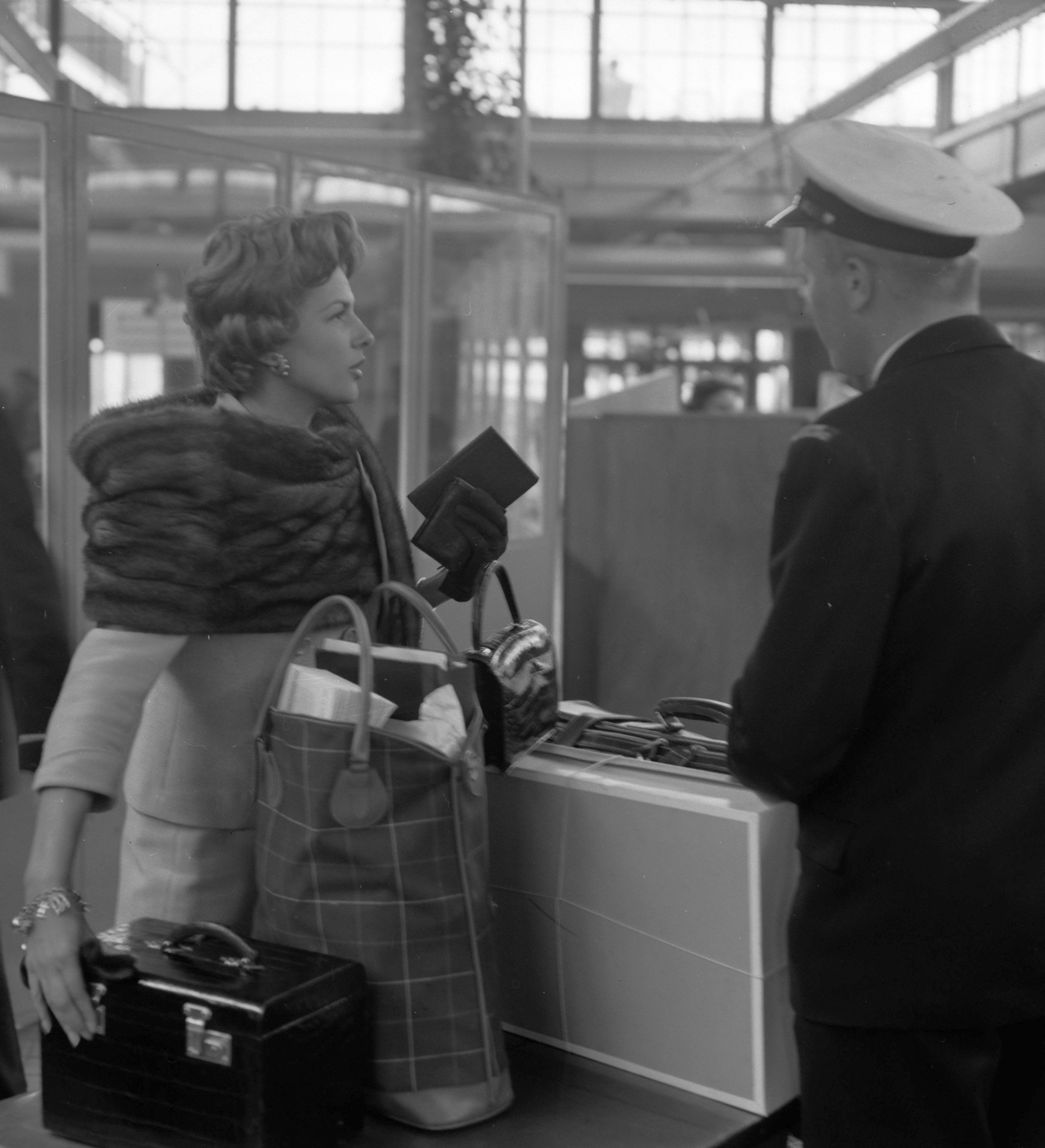 Collectie / Archief : Fotocollectie Anefo Reportage / Serie : [ onbekend ] Beschrijving : Aankomst van de Franse filmster Nicole Maurey op Schiphol Datum : 19 mei 1959 Fotograaf : Rossem, Wim van / Anefo Auteursrechthebbende : Nationaal Archief Materiaalsoort : Negatief (zwart/wit) Nummer archiefinventaris : bekijk toegang 2.24.01.04 Bestanddeelnummer : 910-3817